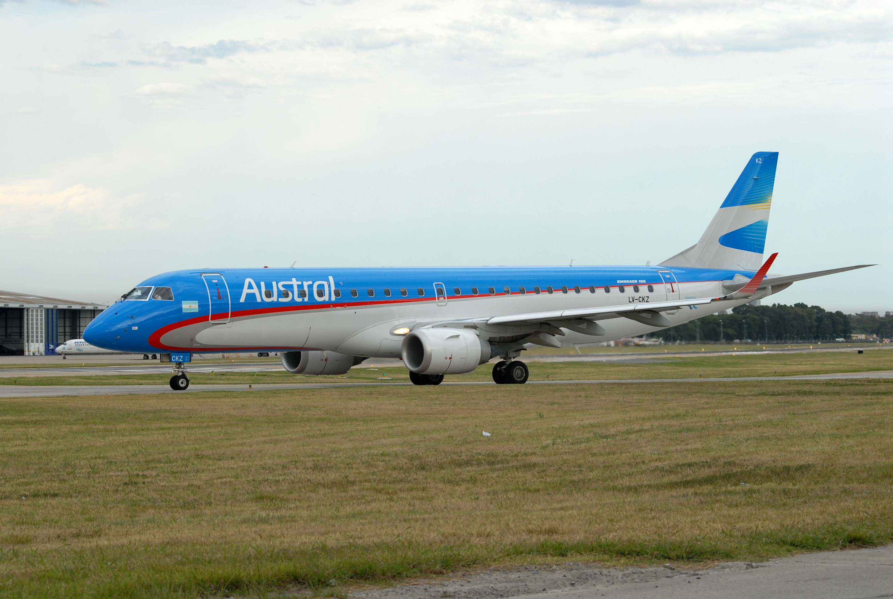 Austral Embraer ERJ-190AR LV-CKZ msn 19000439 seen at Buenos Aires Aeroparque.